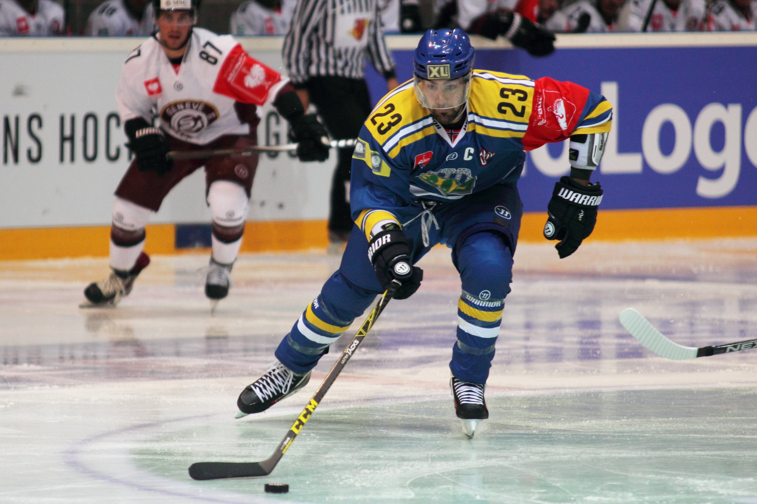 Christian Larrivée (H 23).